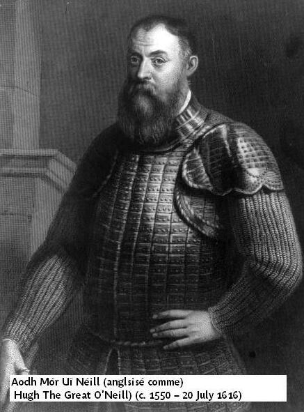 Aodh_Uî_Neill (né à Dungannon 1550-1616 mort à Rome) Earl du Tyrone /